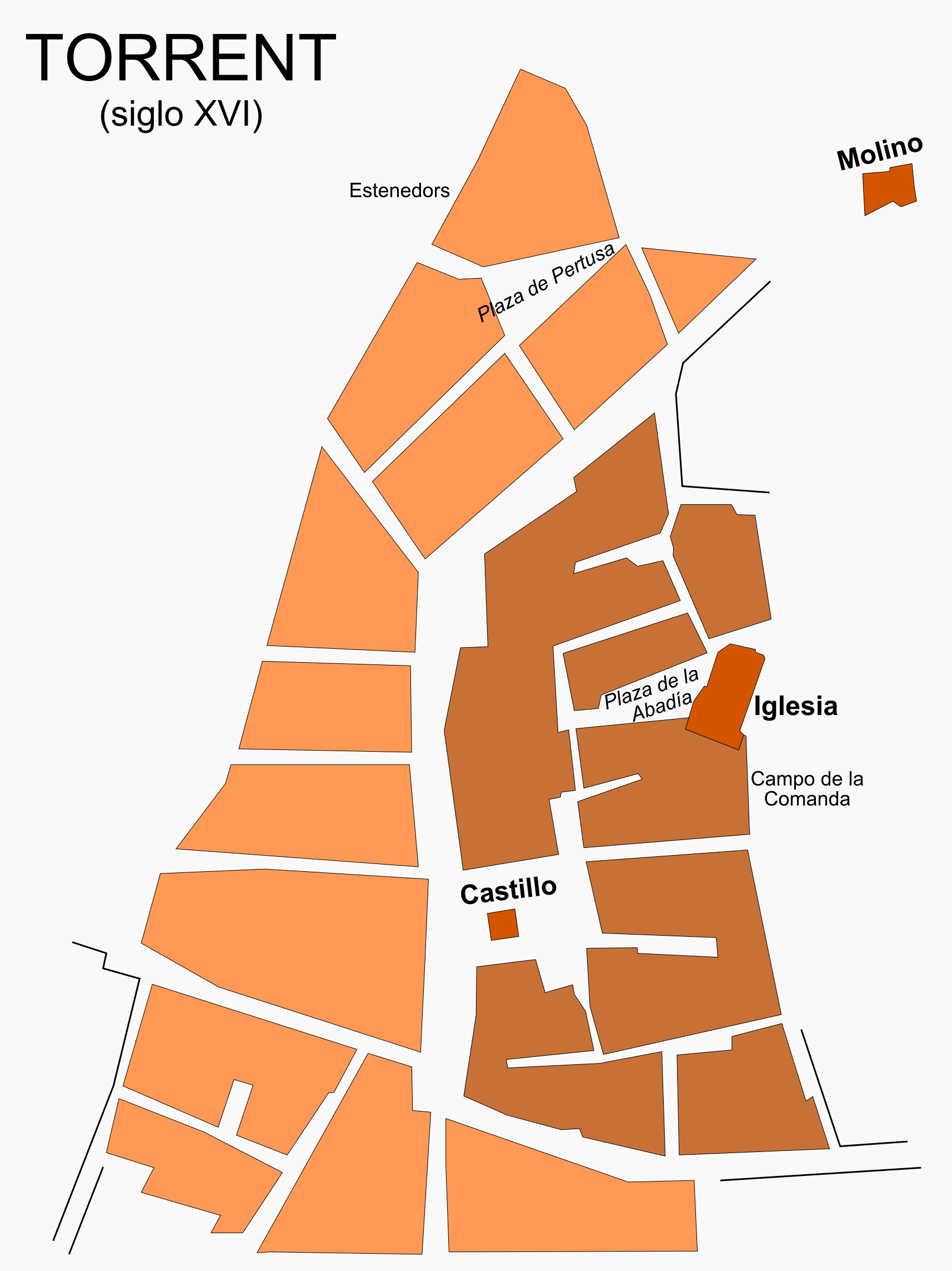 Mapa de Torrente en el siglo XVI según V. Rosselló y Sancho Royo.